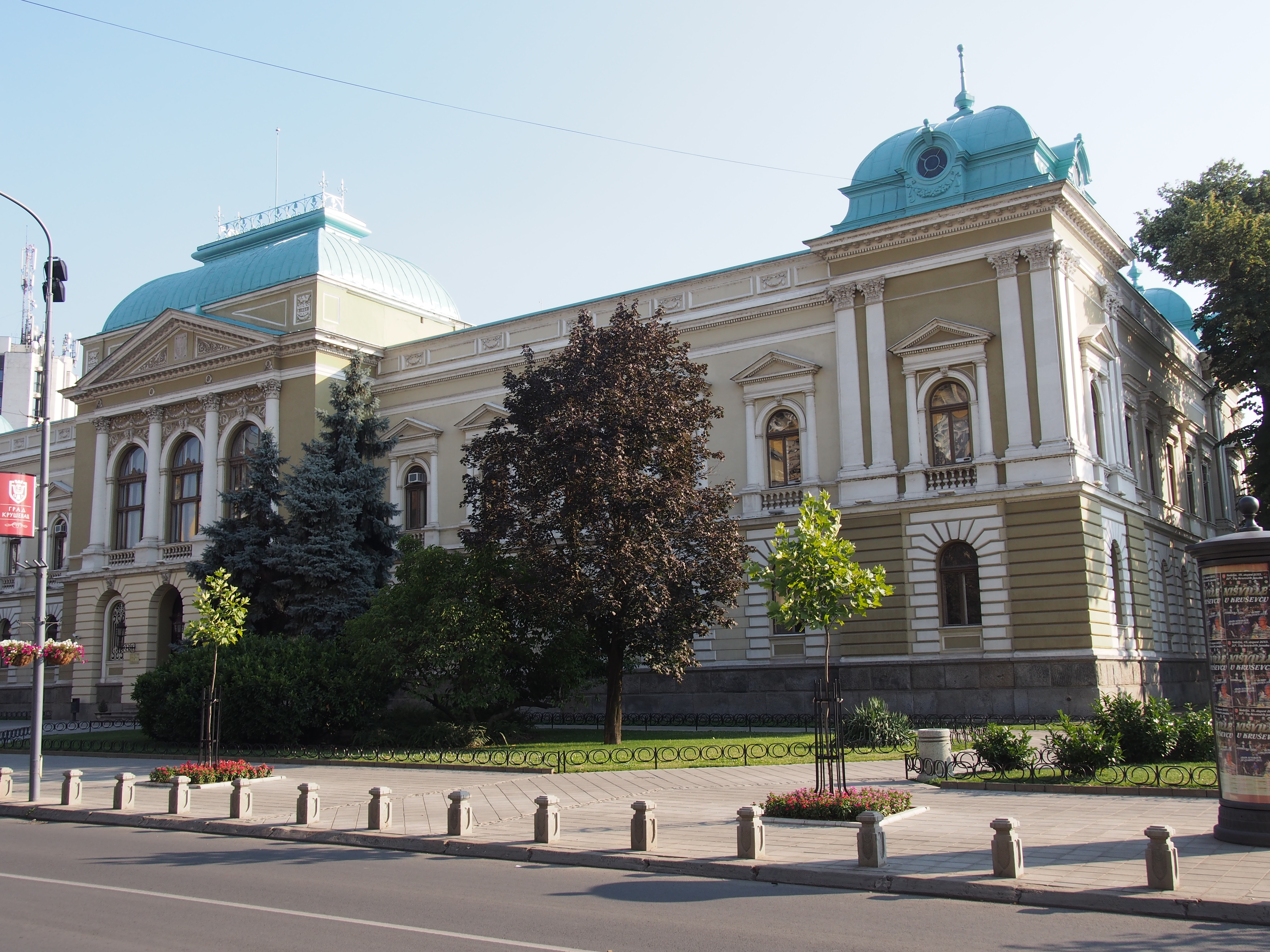 Српски (ћирилица): Крушевац, зграда Окружног начелства